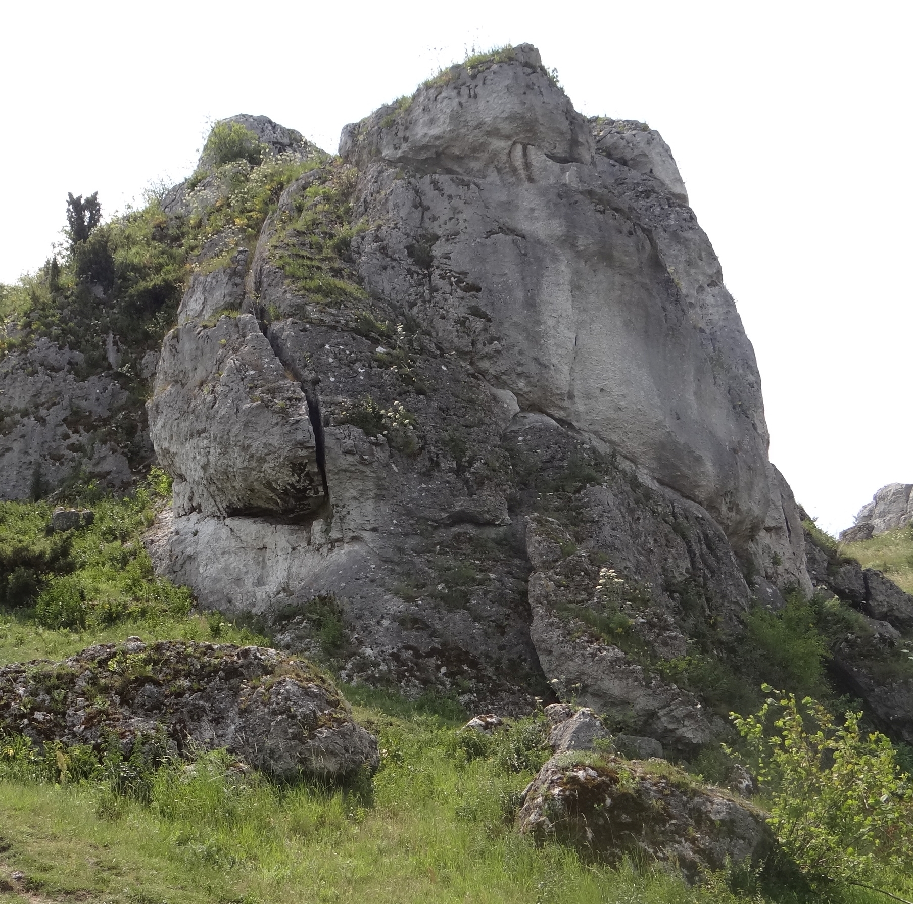 Skała Żółty Filar na Zamku w Olsztynie